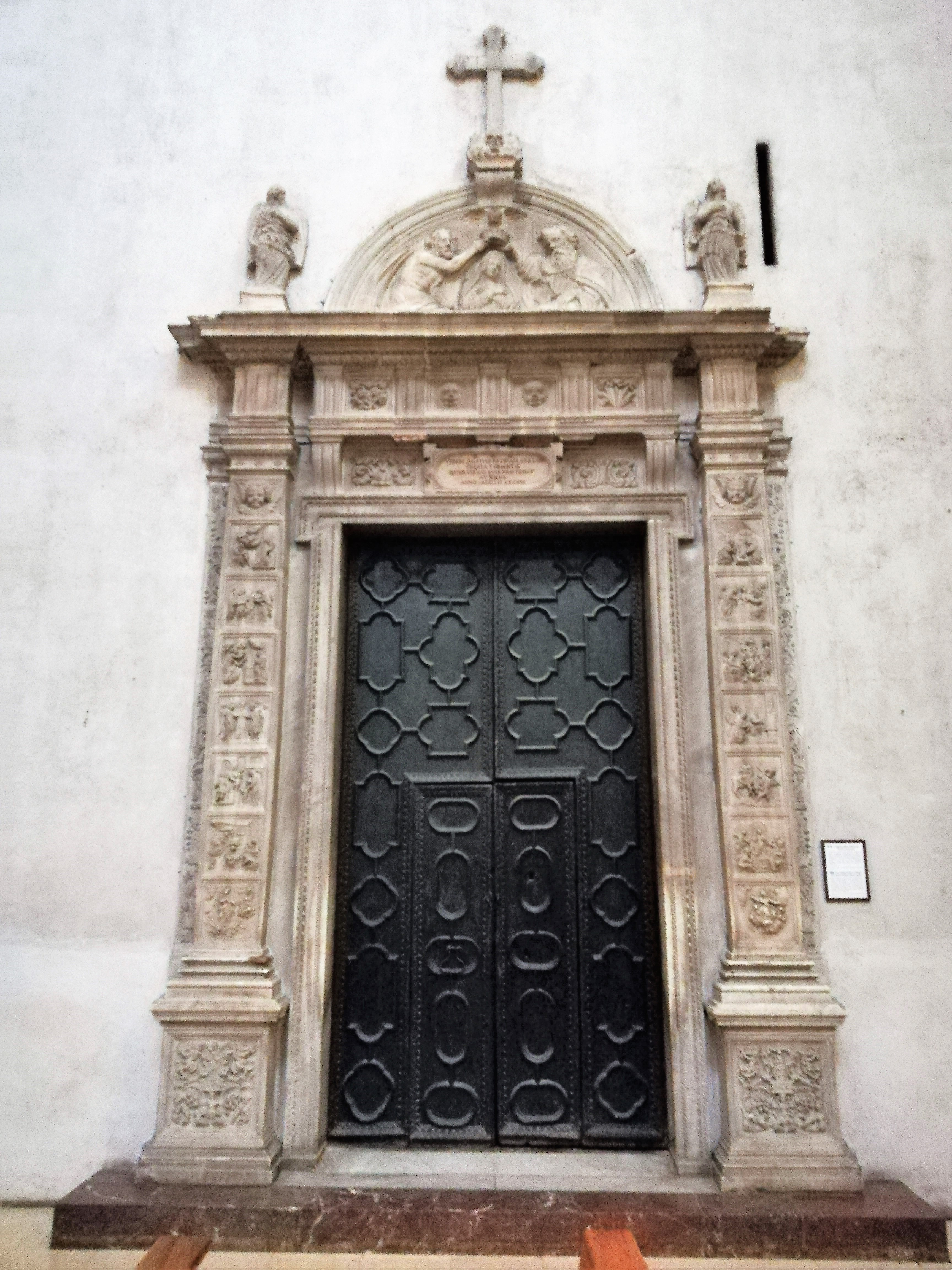 Cappella.